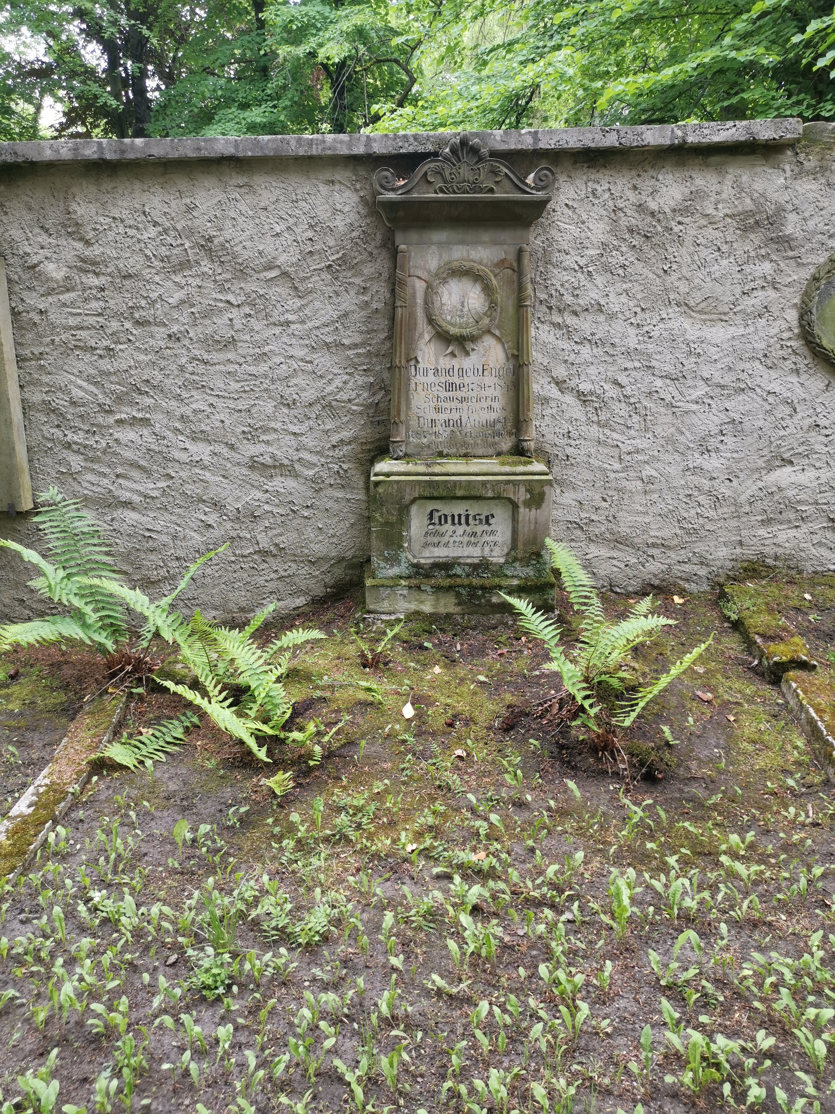 Grabstätte der Schauspieler Ernestine und August Durand, Historischer Friedhof Weimar